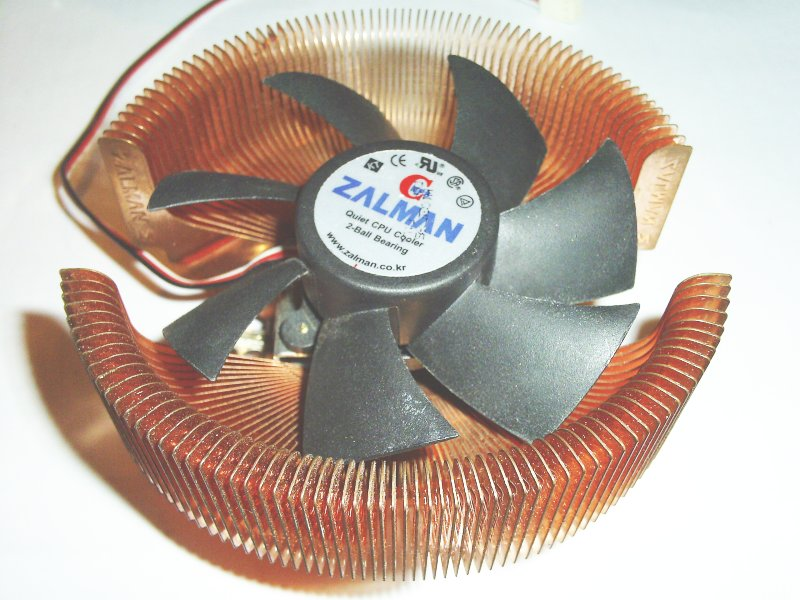 A Zalman 7000 heatsink.